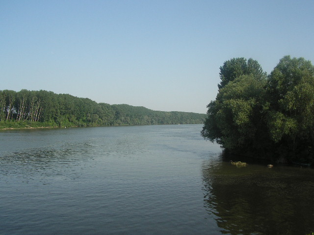 A Duna–Tisza–Duna-csatorna a beömlése a Tiszába Óbecsénél